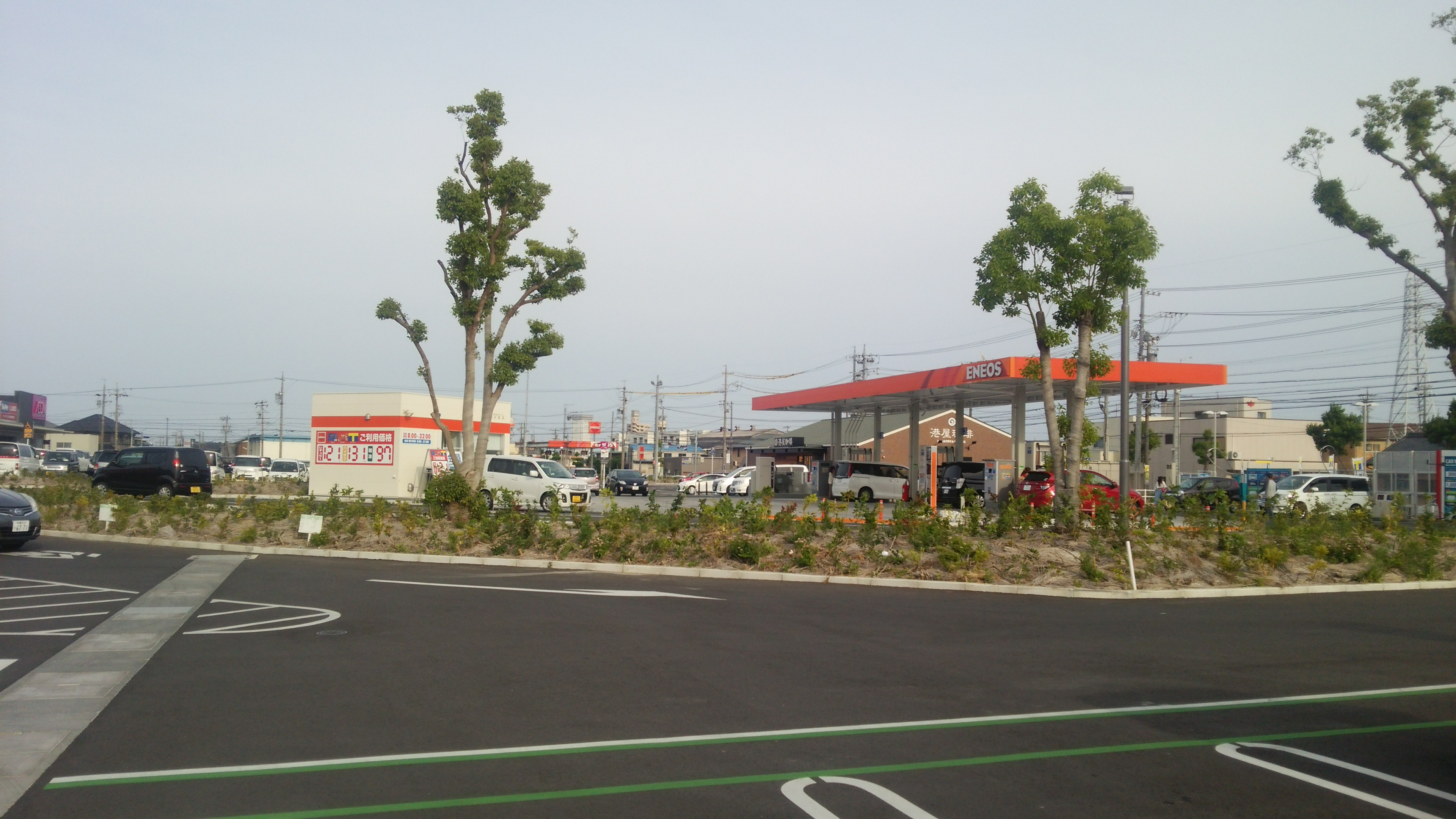 イオンタウン鈴鹿玉垣のガソリンスタンド